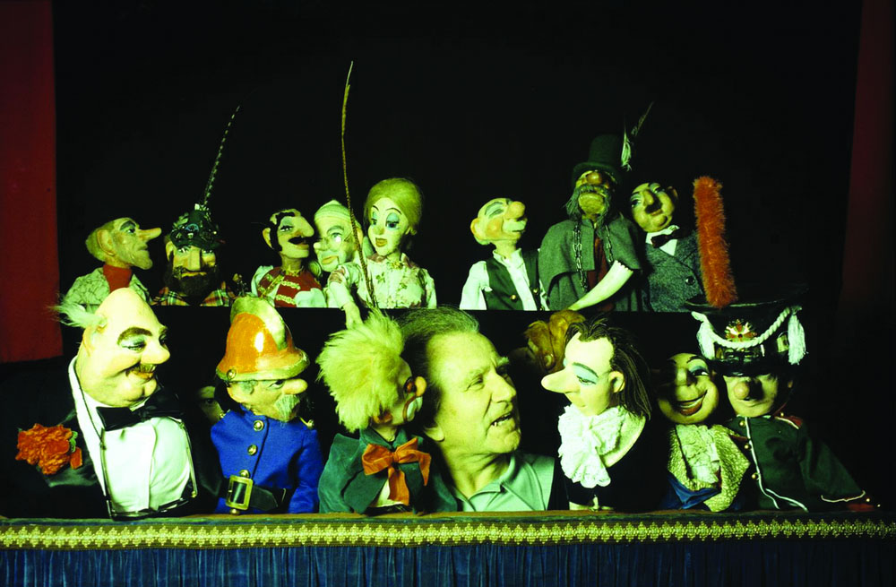 Porträt von Rolf Trexler